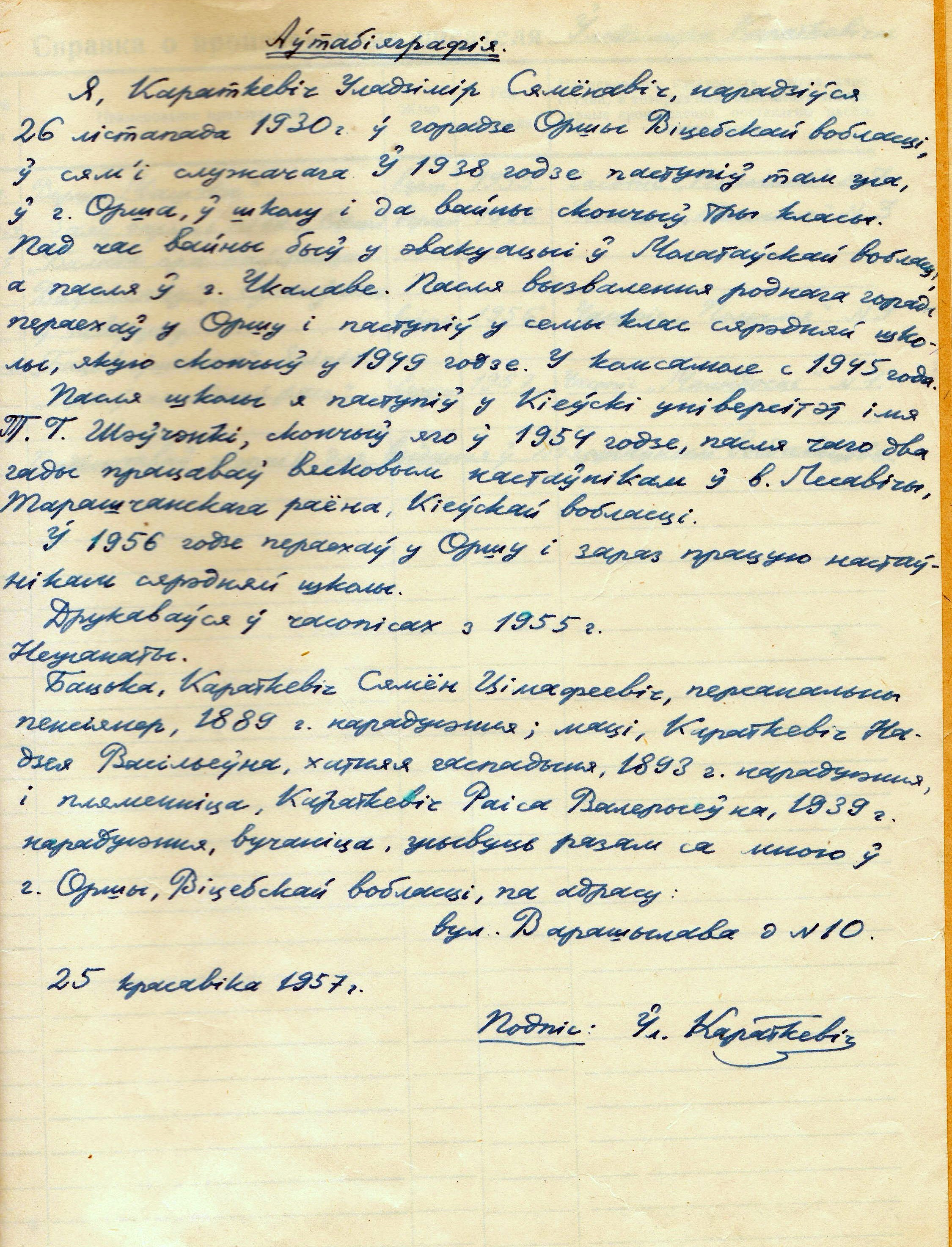 Аўтабіяграфія Уладзіміра Караткевіча з асабовай справы пісьменніка (25 красавіка 1957 г.)